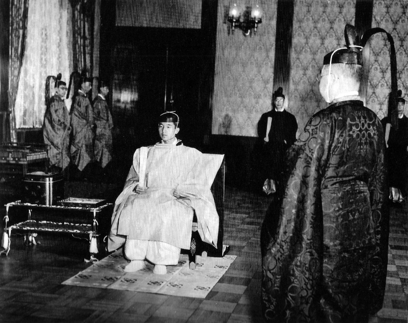 明仁親王(Prince Akihito)の「立太子の礼」